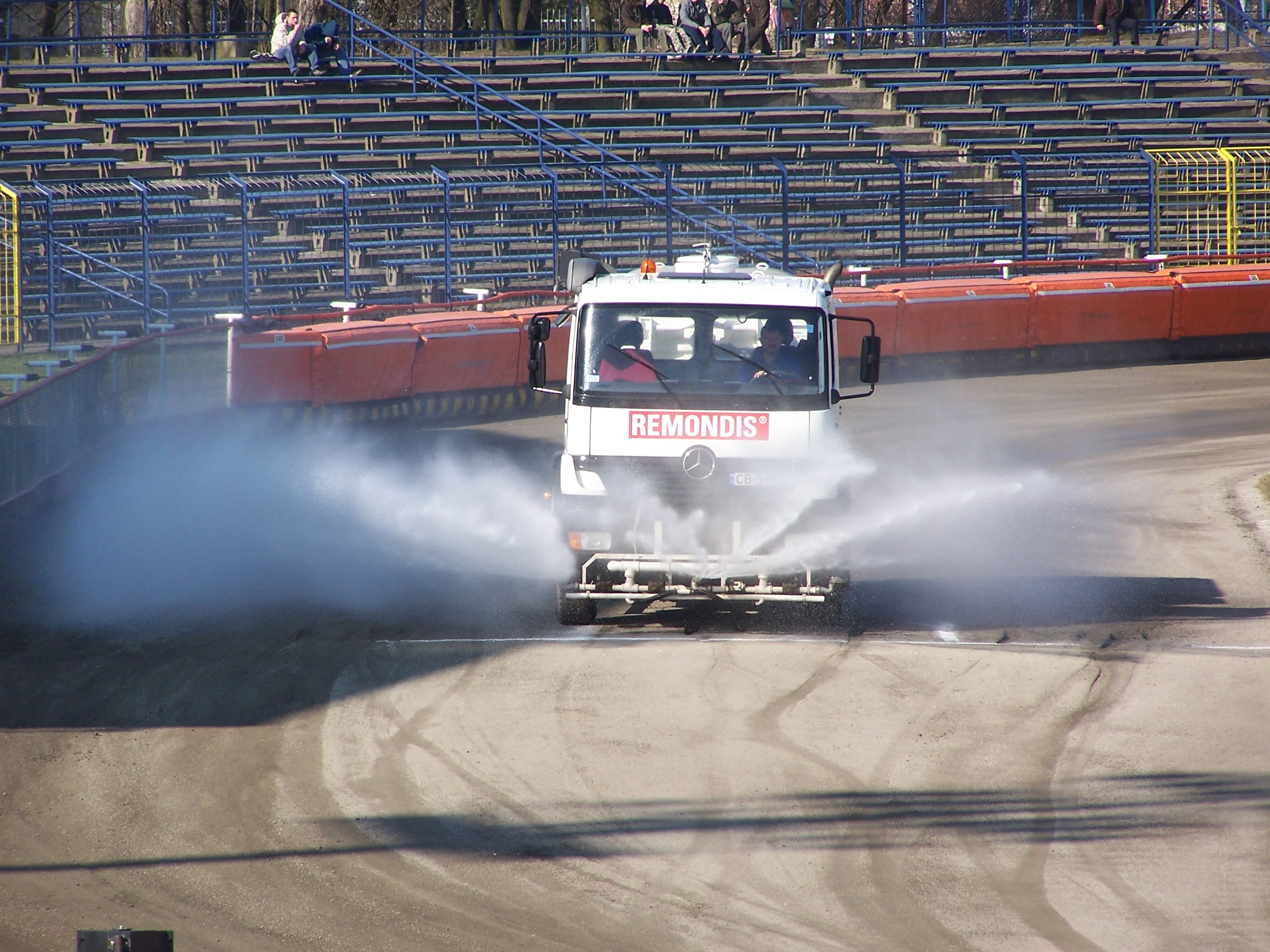 polewaczka podczas polewania toru żużlowego